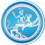 Геральдический символ Президента Республики Казахстан